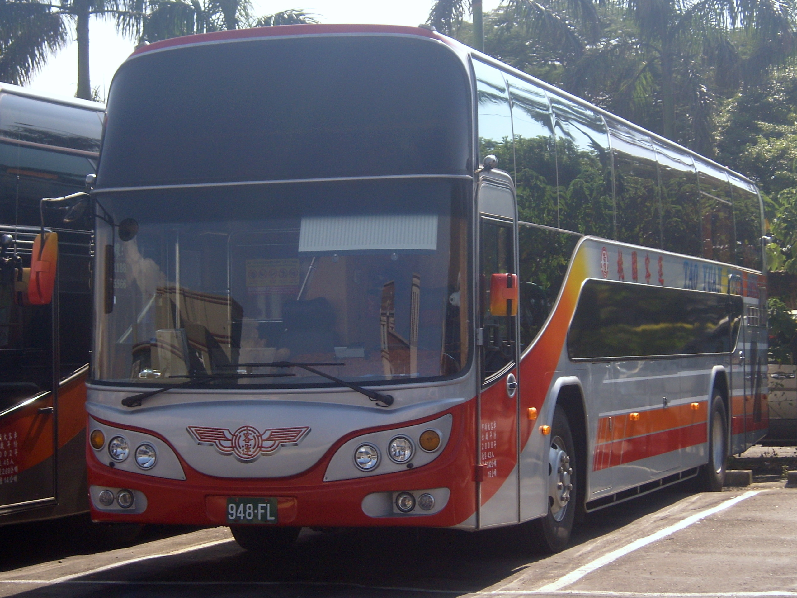 Taoyuan Bus - HINO RN8JSSA.